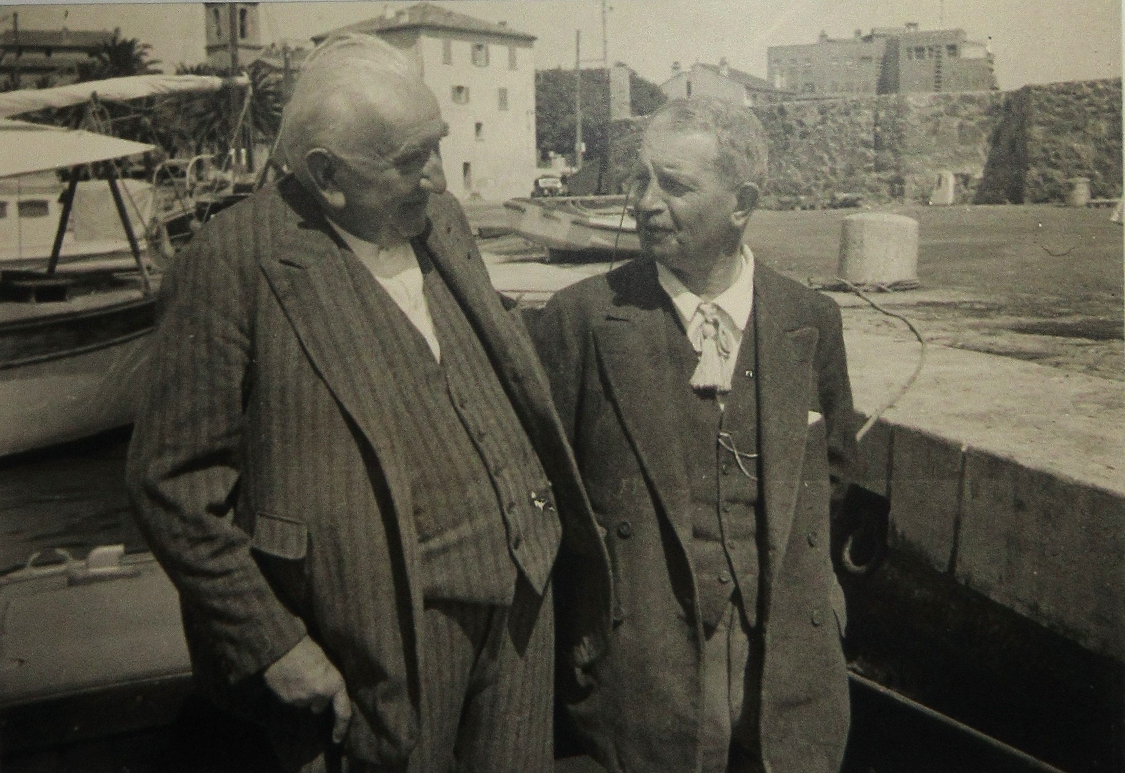 Auteur anonyme. Domaine public.